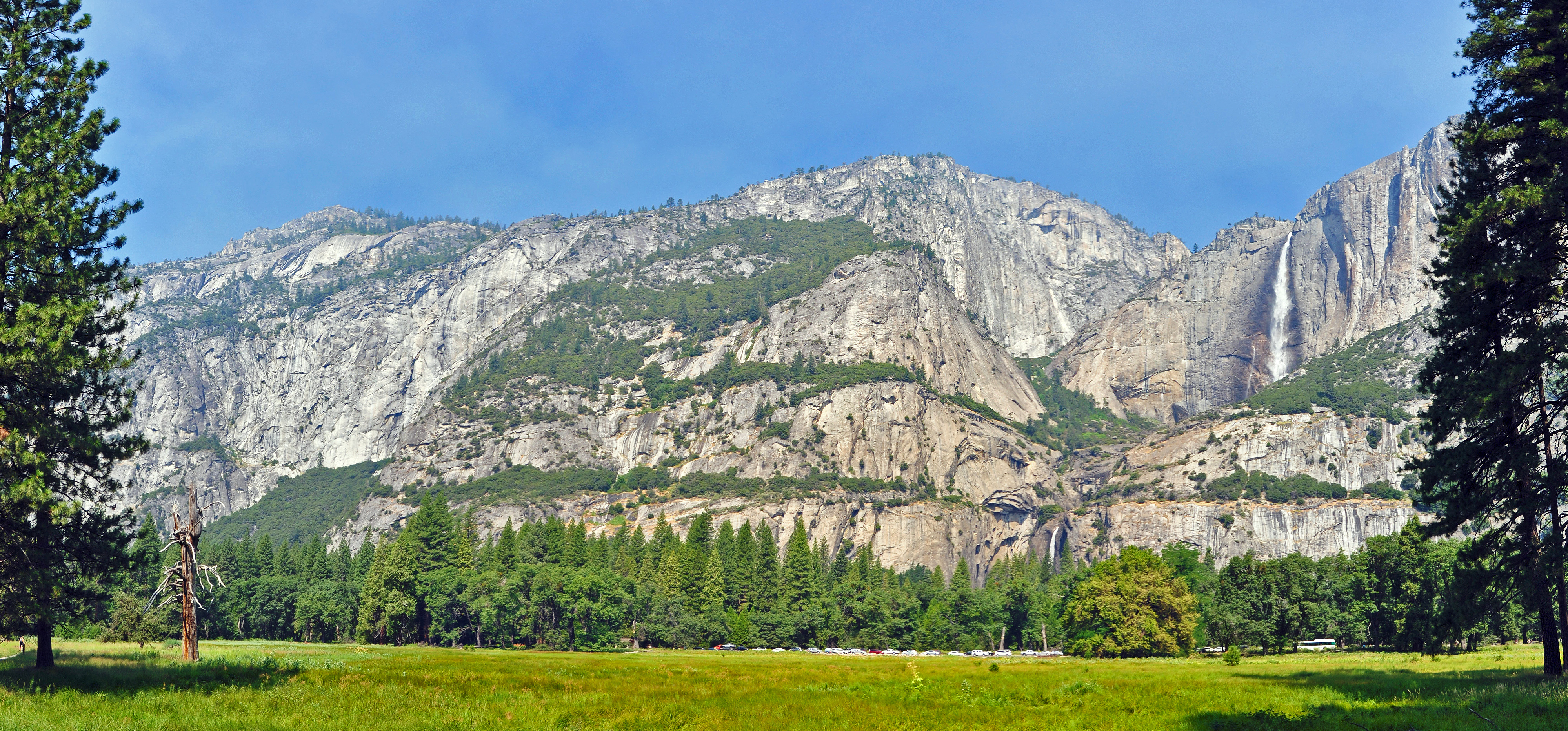 Panorama delle cascate dello Yosemite National Park - California, USA -Agosto 2011.